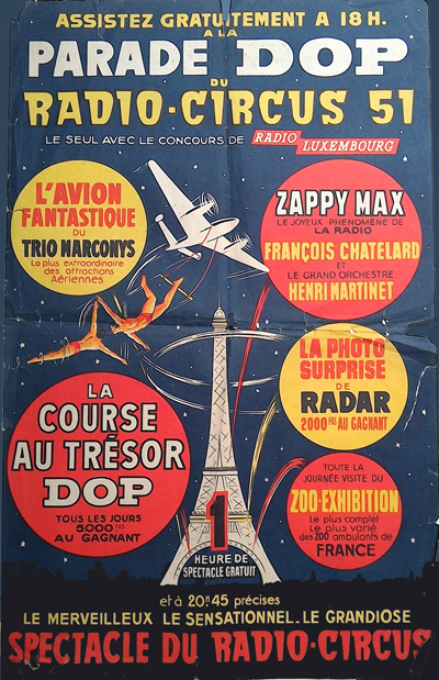 Affiche de 1951 annonçant Le spectacle radio circus